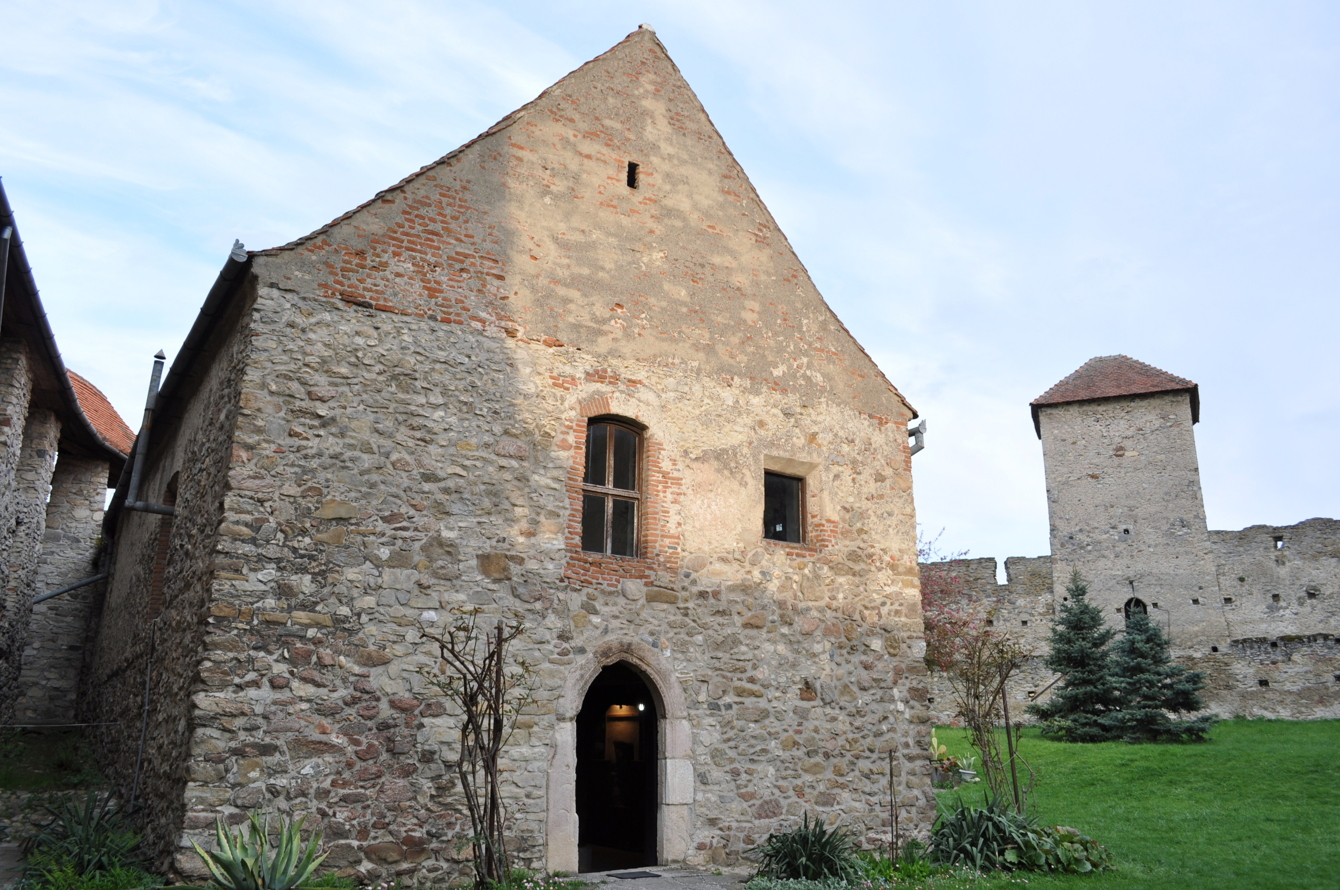 Cetatea Câlnic, județul Alba 03